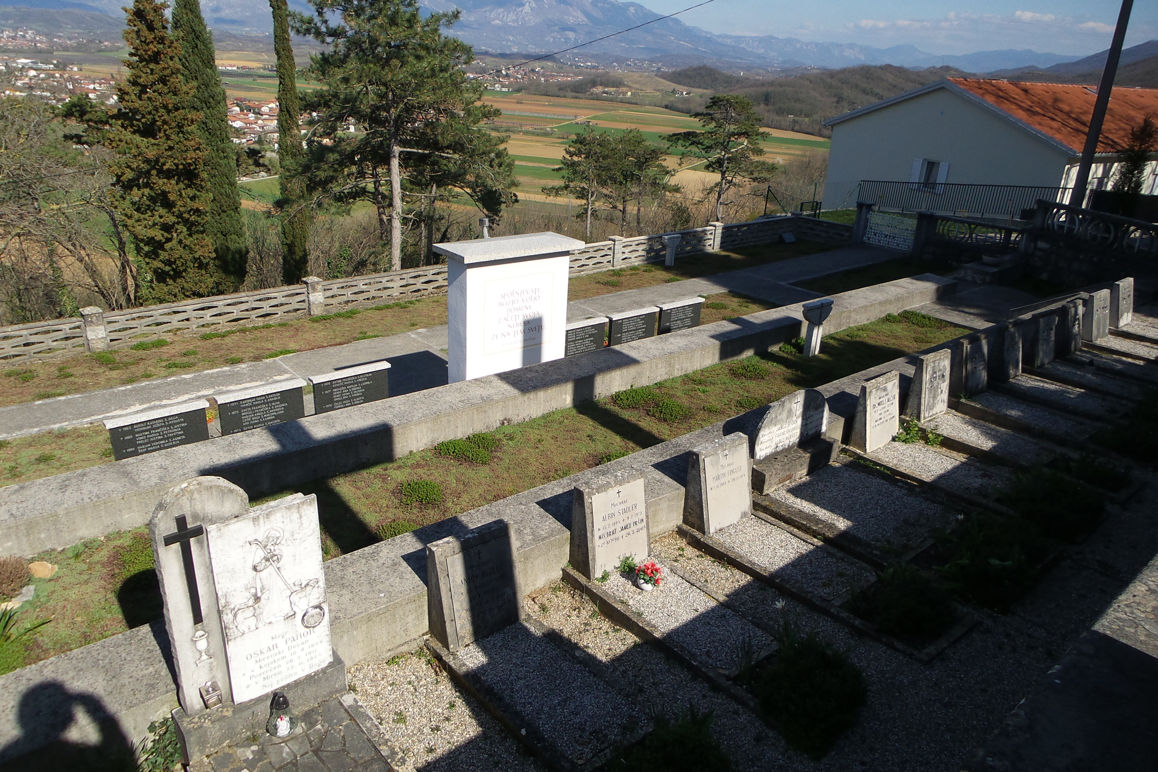 Pokopališče na Mirenskem Gradu